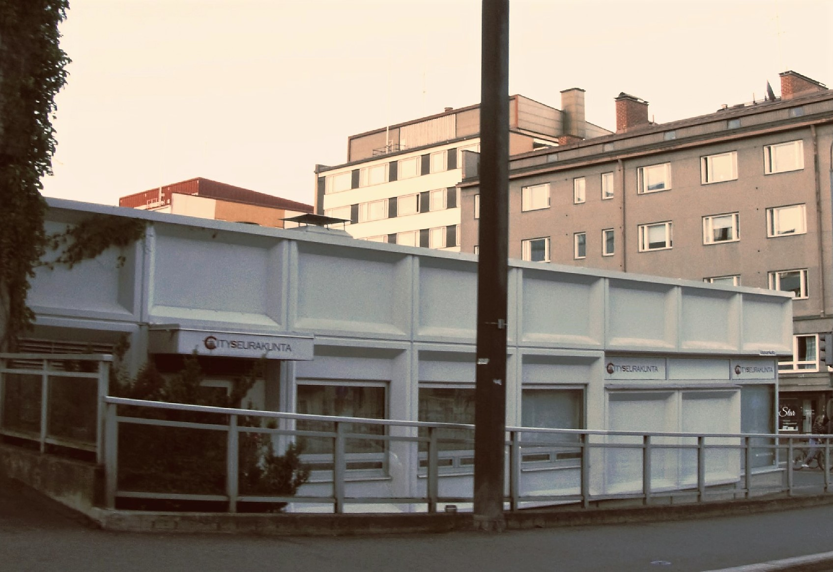 Jyväskylän Cityseurakunnan toimitila